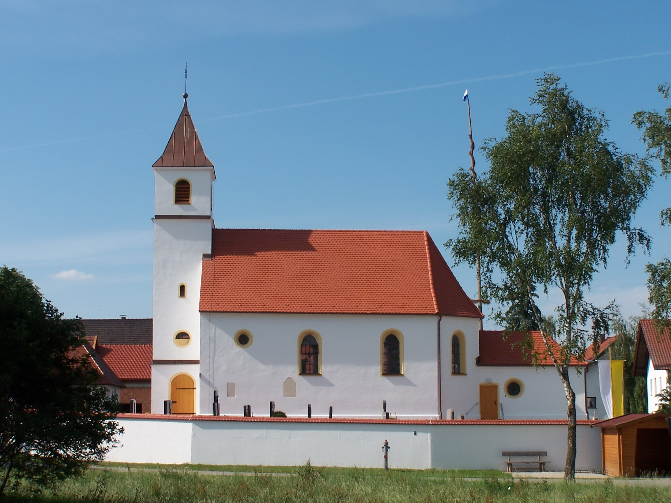 Hohenthann, Grafenhaun. Kirche St. Margaretha. Barocke Anlage von 1717/19; mit Ausstattung.